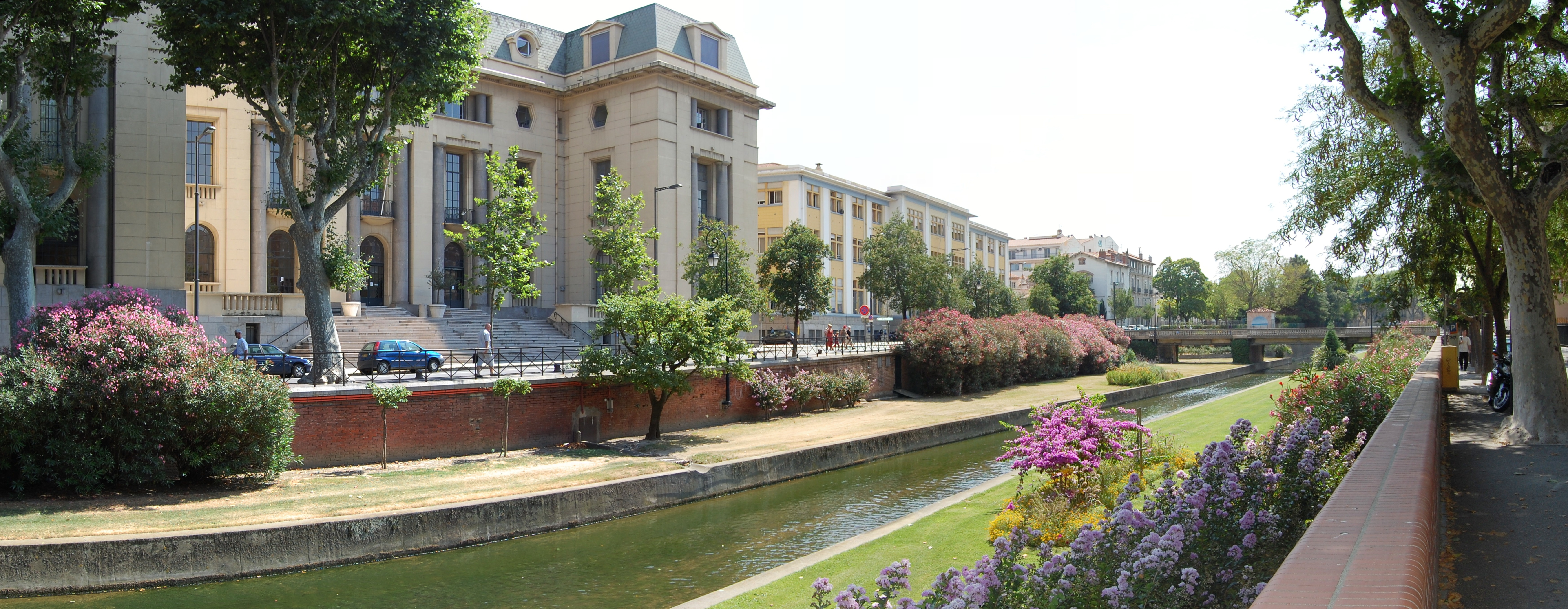 La Basse, affluent de la Têt à Perpignan (Pyrénées-Orientales, France). Appareil photo utilisé : Nikon D40.